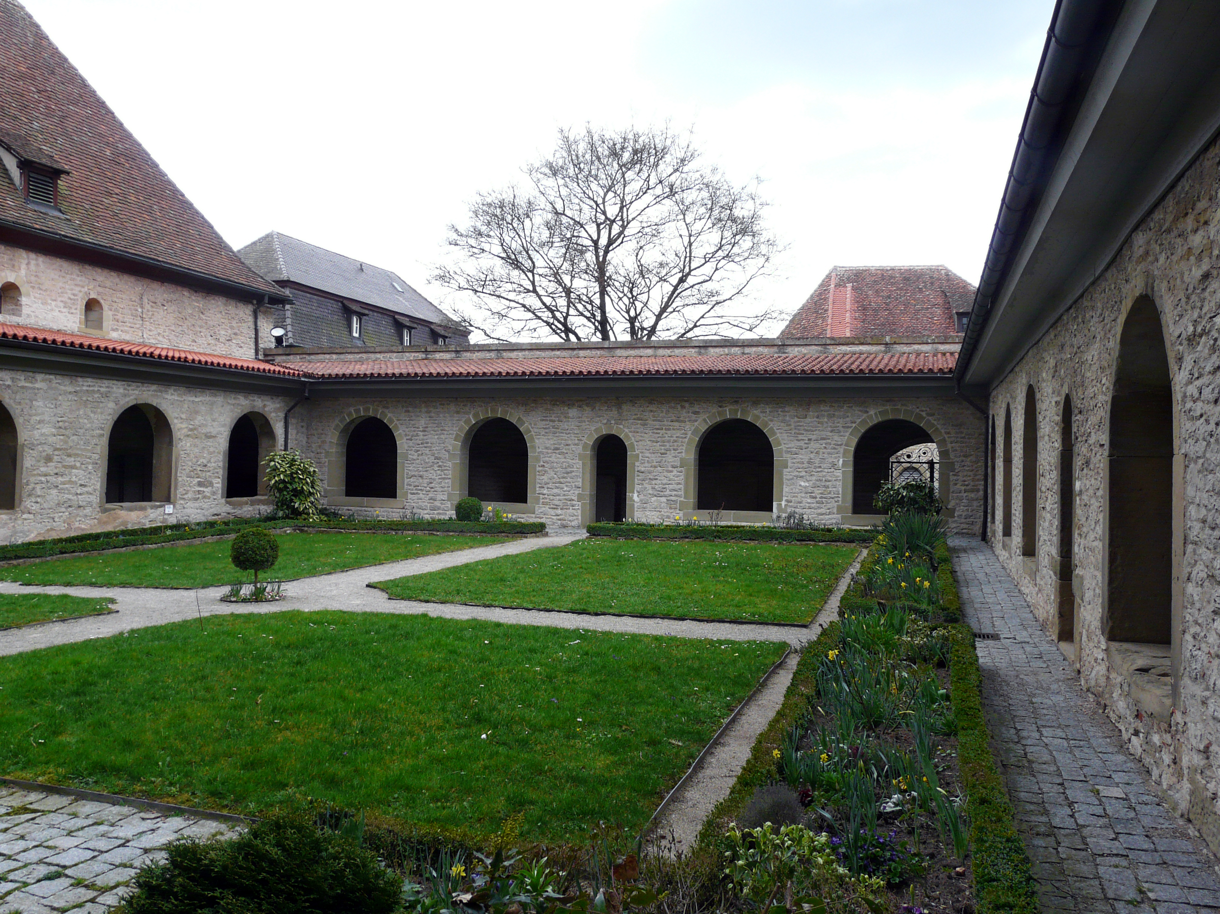 Клаузур